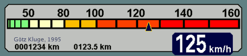 energieproportionale Tachoanzeige